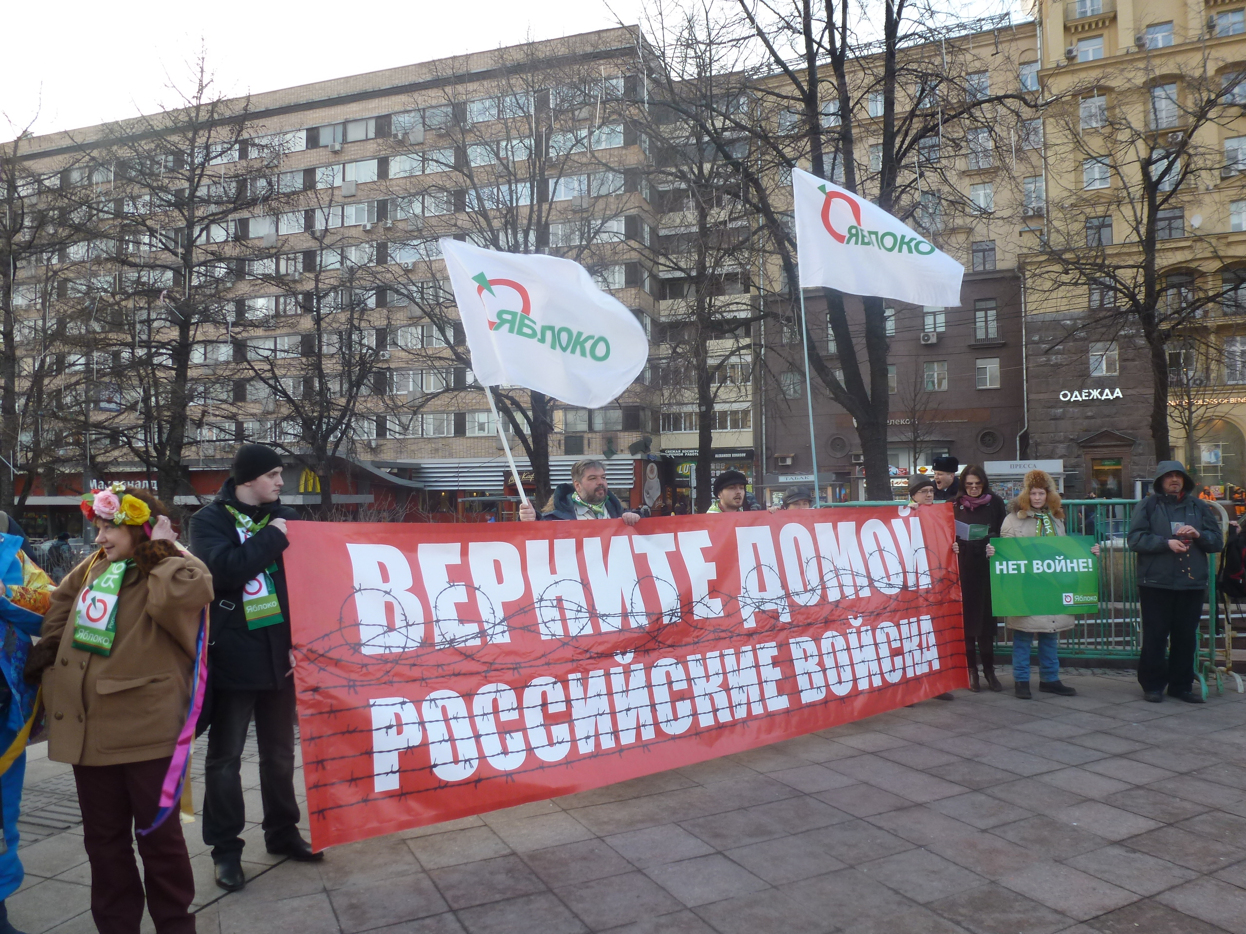 Kontraŭmilita pikedo en Moskvo, 7-a de marto 2014